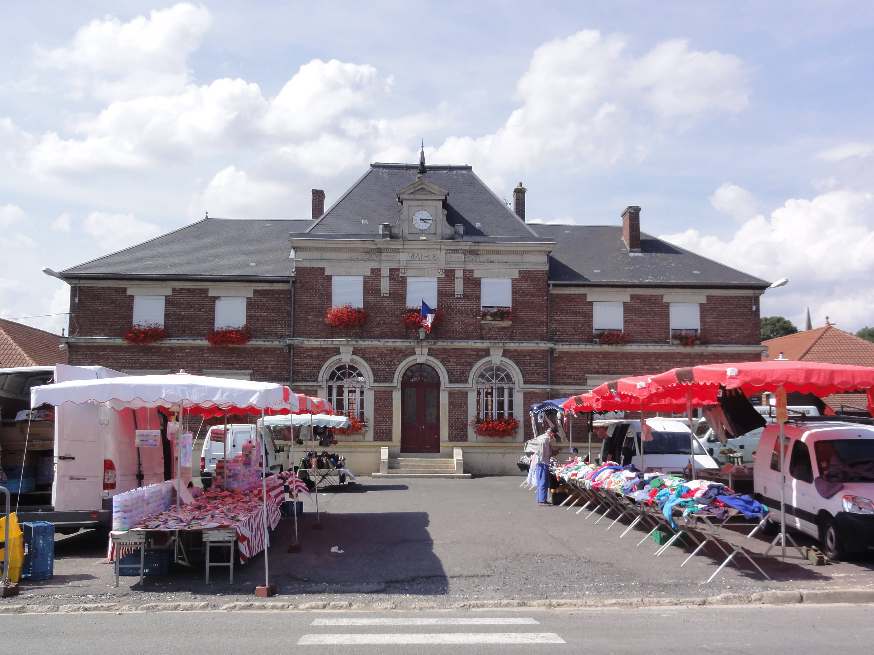 Hargicourt (Aisne) mairie